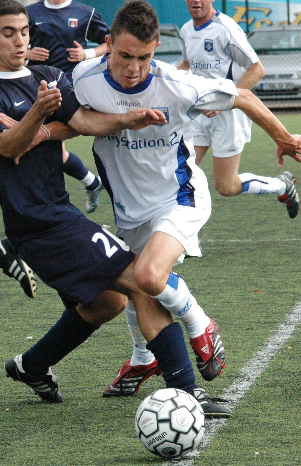 pierre en el Aj auxerre durante un partido en 07